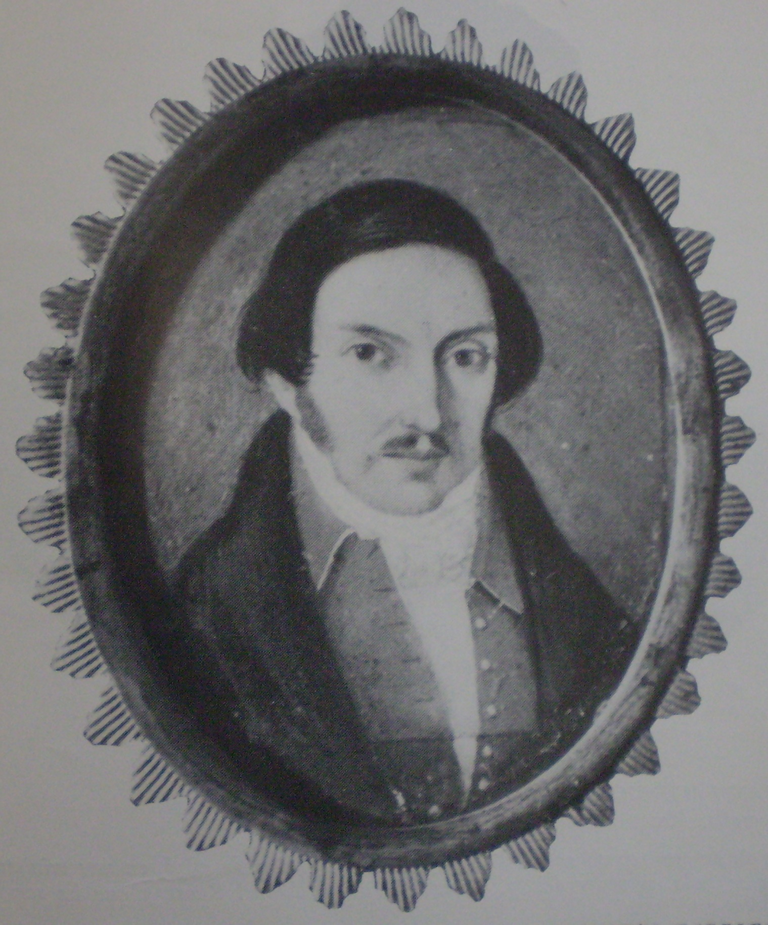 Agustín Garrigós, miniatura de autor anónimo. Original en el Museo Colonial e Histórico "Enrique Udaondo", de Luján